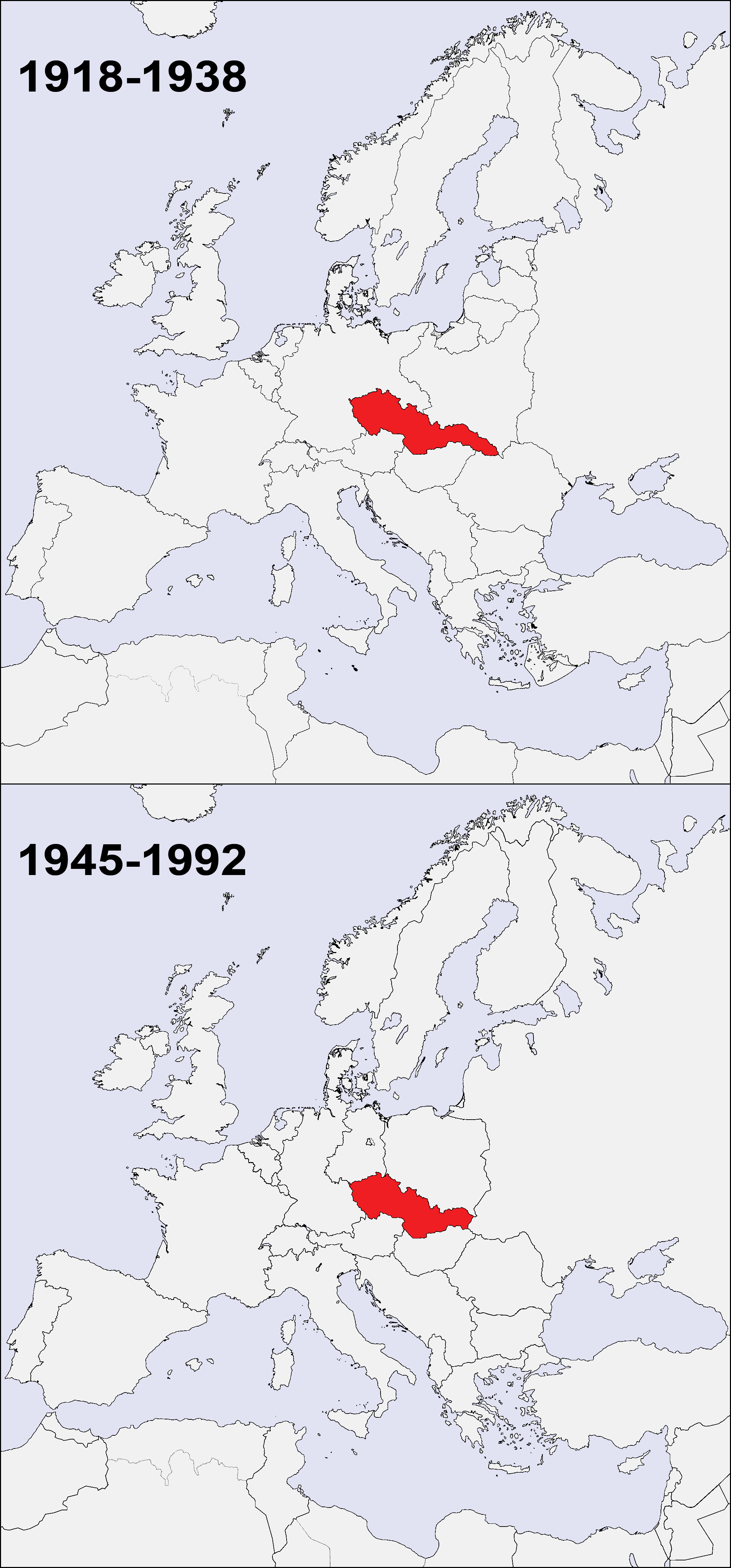 Lage der Tschechoslowakei vor und nach dem 2. Weltkrieg